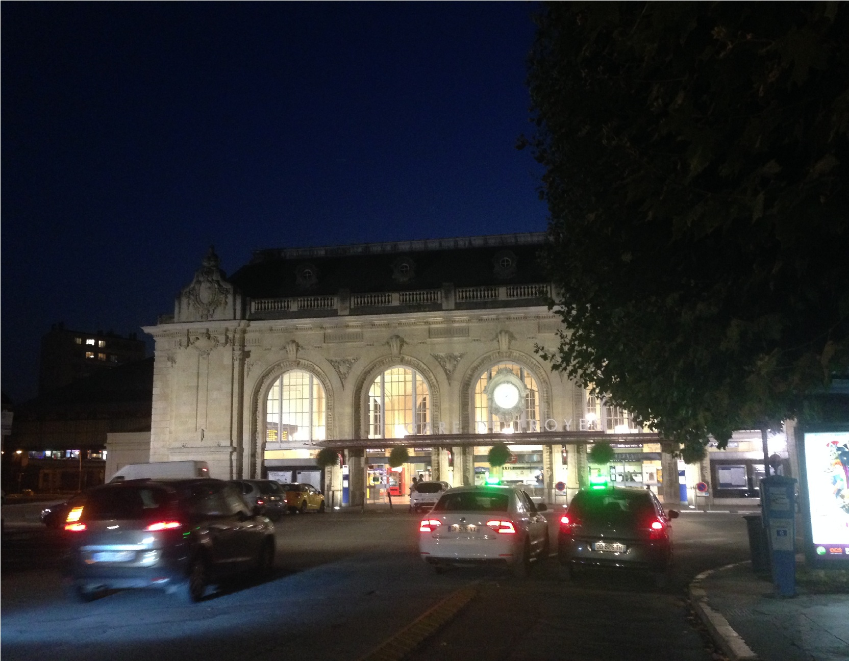 Gare de Troyes-2015